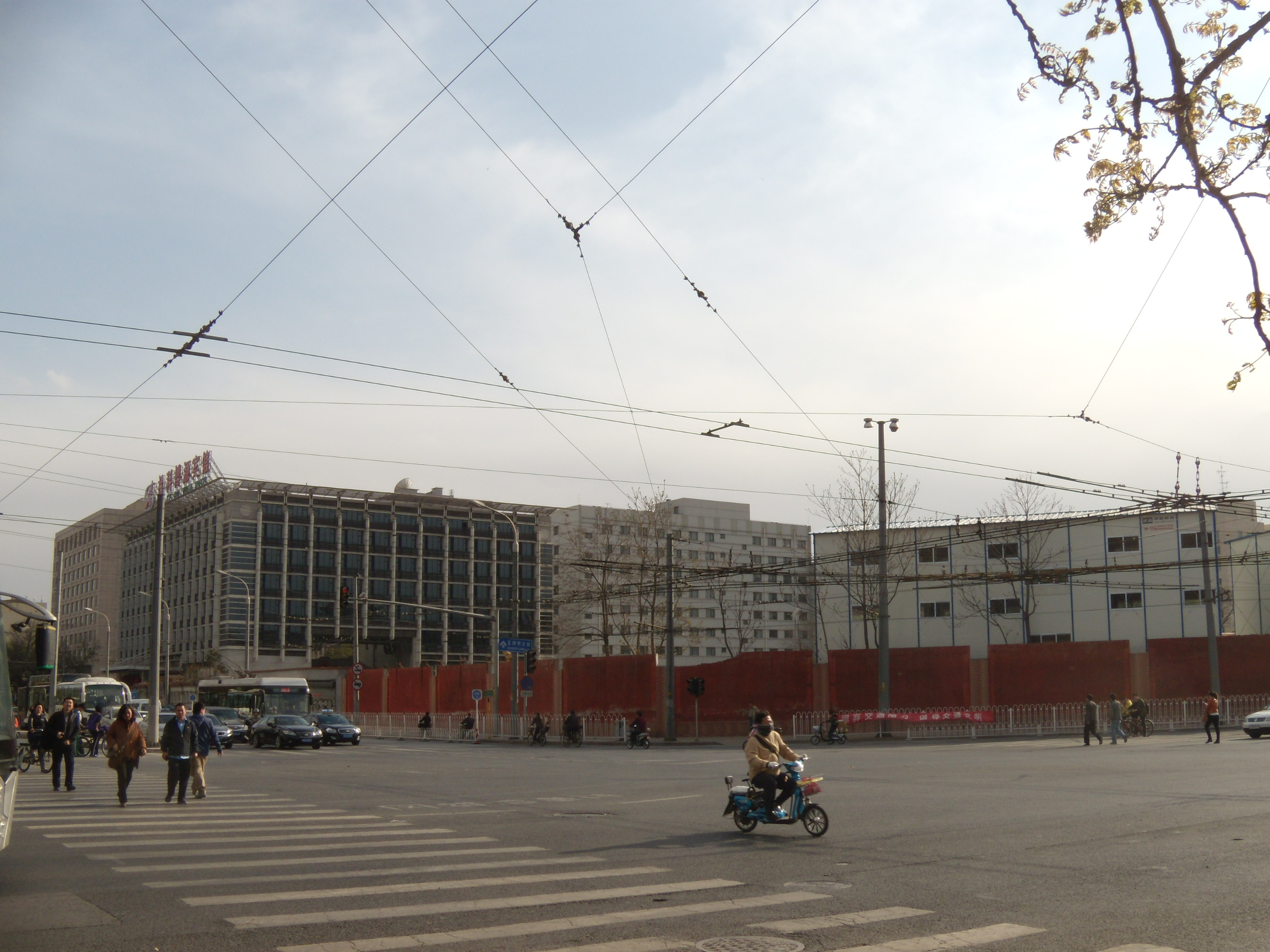 北京黎元洪故居